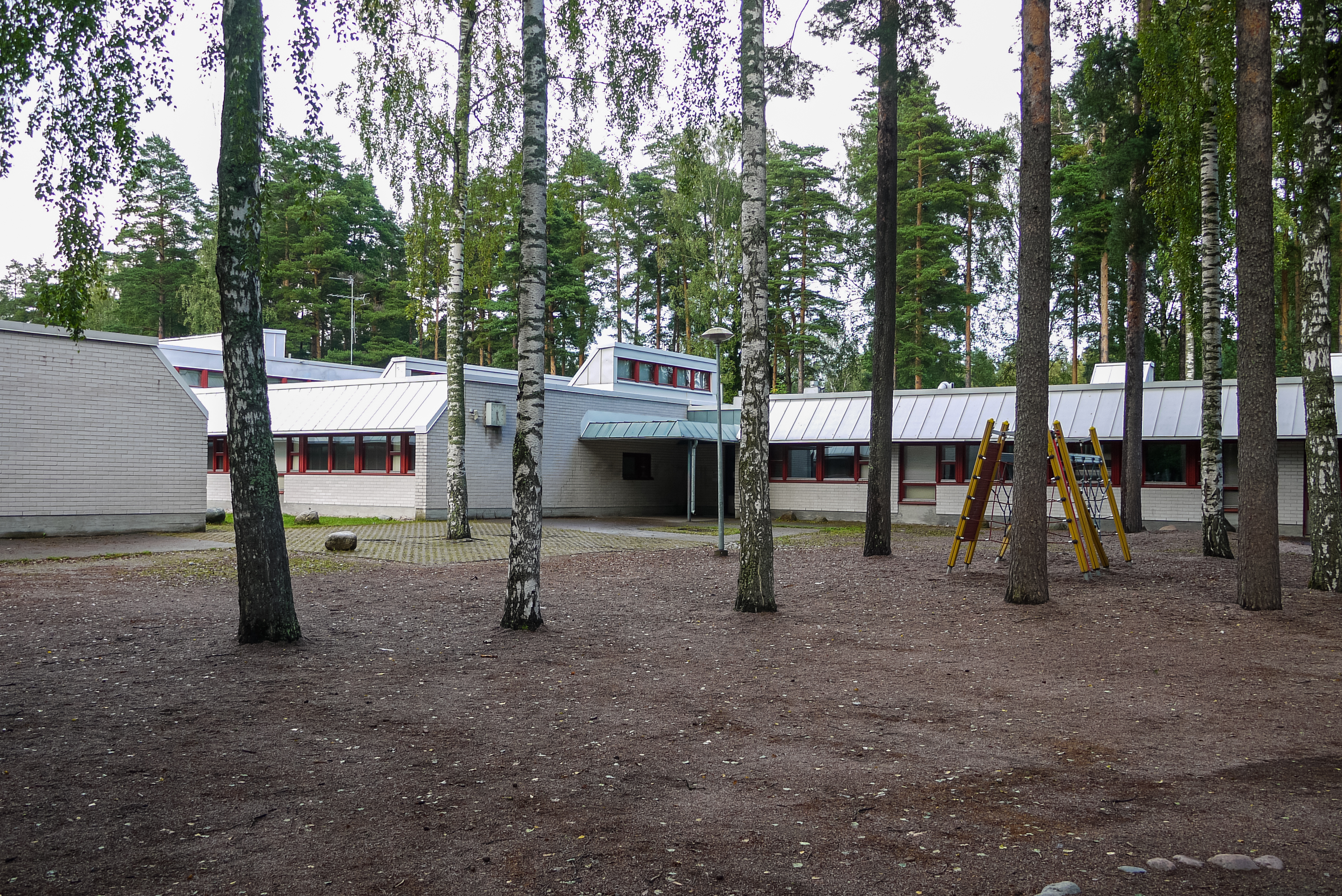 Toppelundin ala-aste